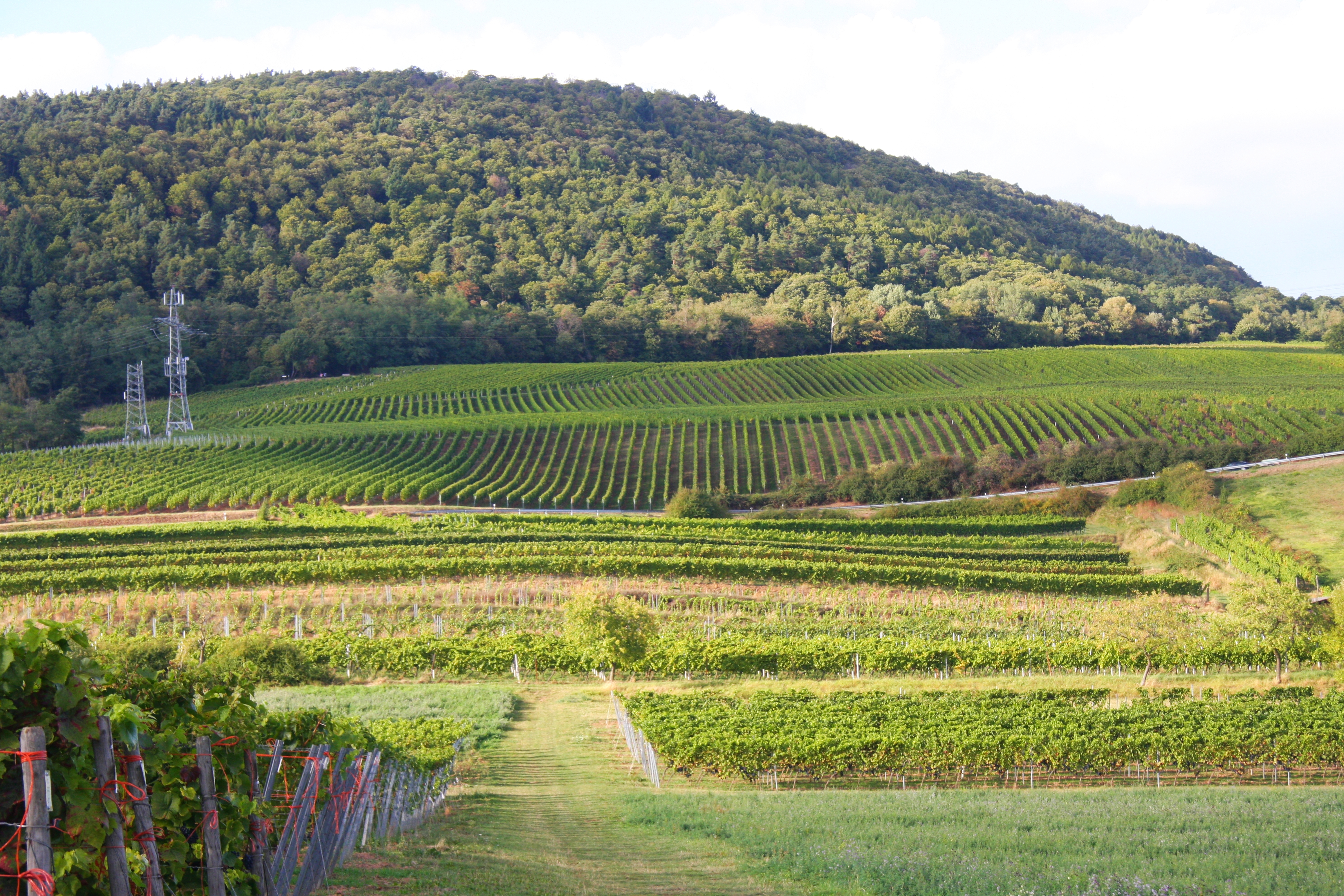 Kolekcja odmian i winnica doświedczalna